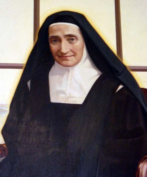 Джузеппа Оперти, основательница монашеской конгрегации терциарных кармелитов